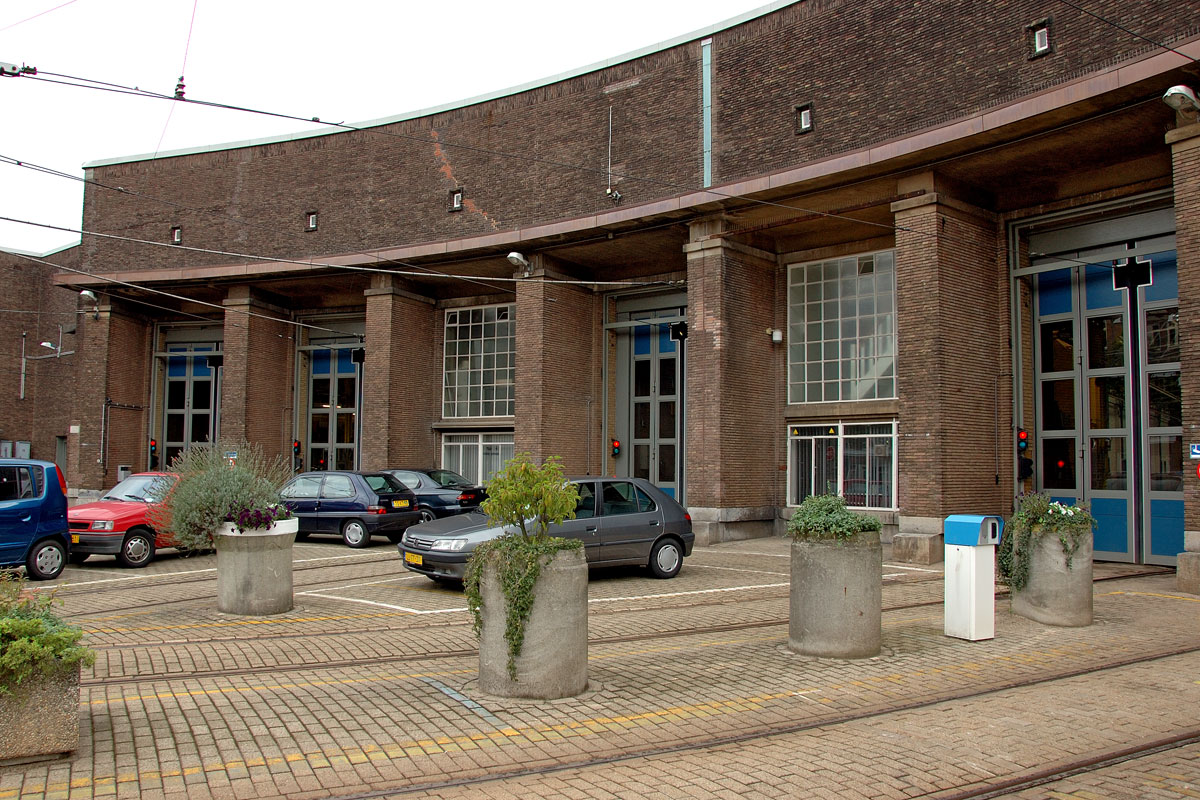 Tramremise Kromme Mijdrechtstraat in Amsterdam